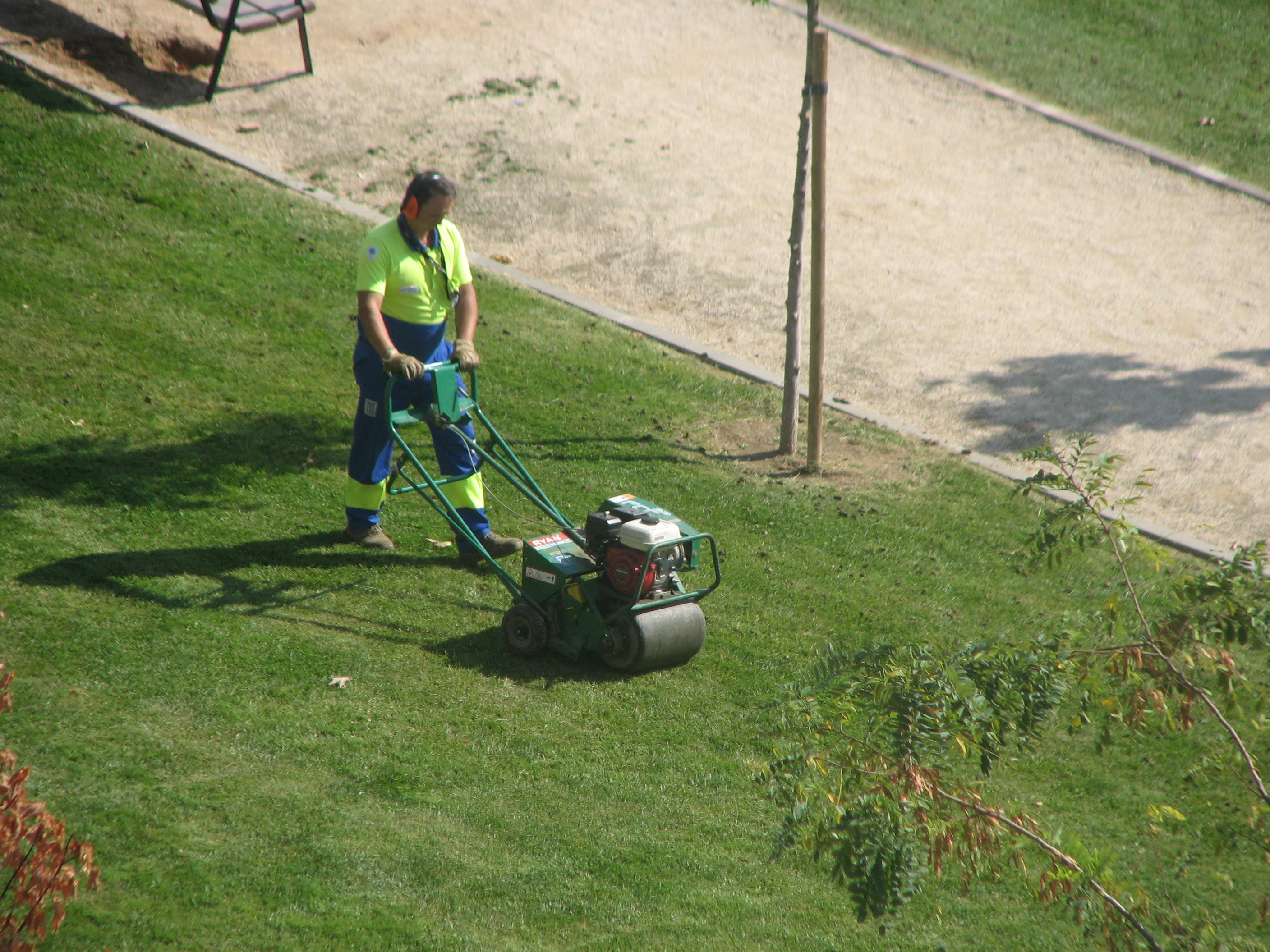 Aireadora con motor térmico, Ryan Lawnaire IV